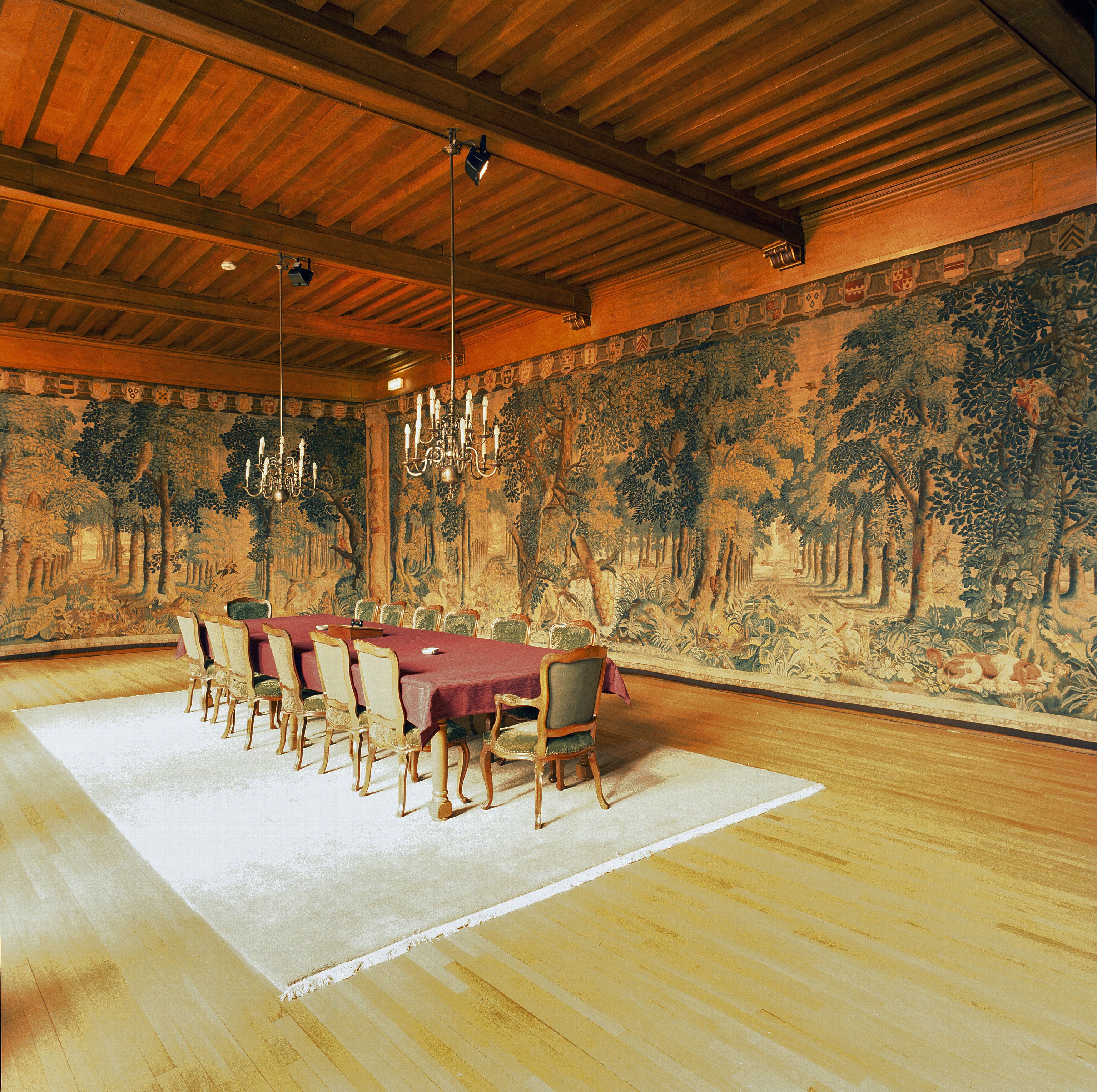 Bartholomeigasthuis: Interieur regentenzaal, overzicht met wandtapijten en balkenplafond